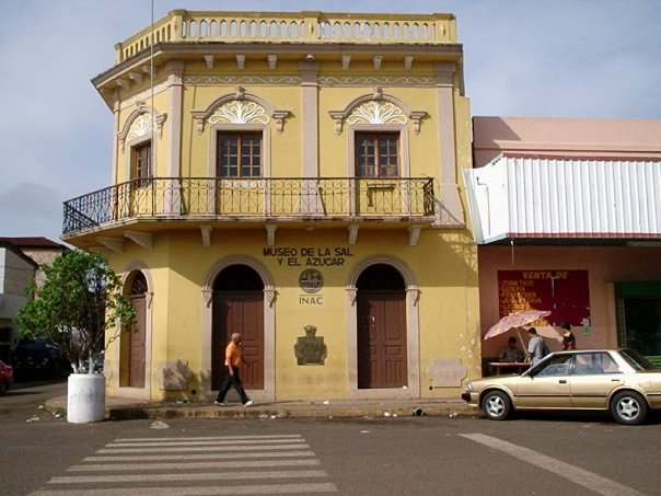 Museo de la Sal y el Azucar